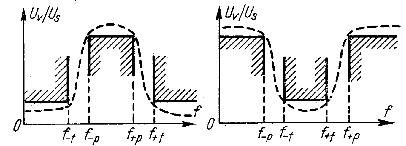 Ribapääsfiltri ja ribatõkkefiltri sagedustunnusjoon